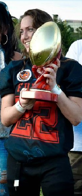 Momento della premiazione al miglior RB del campionato